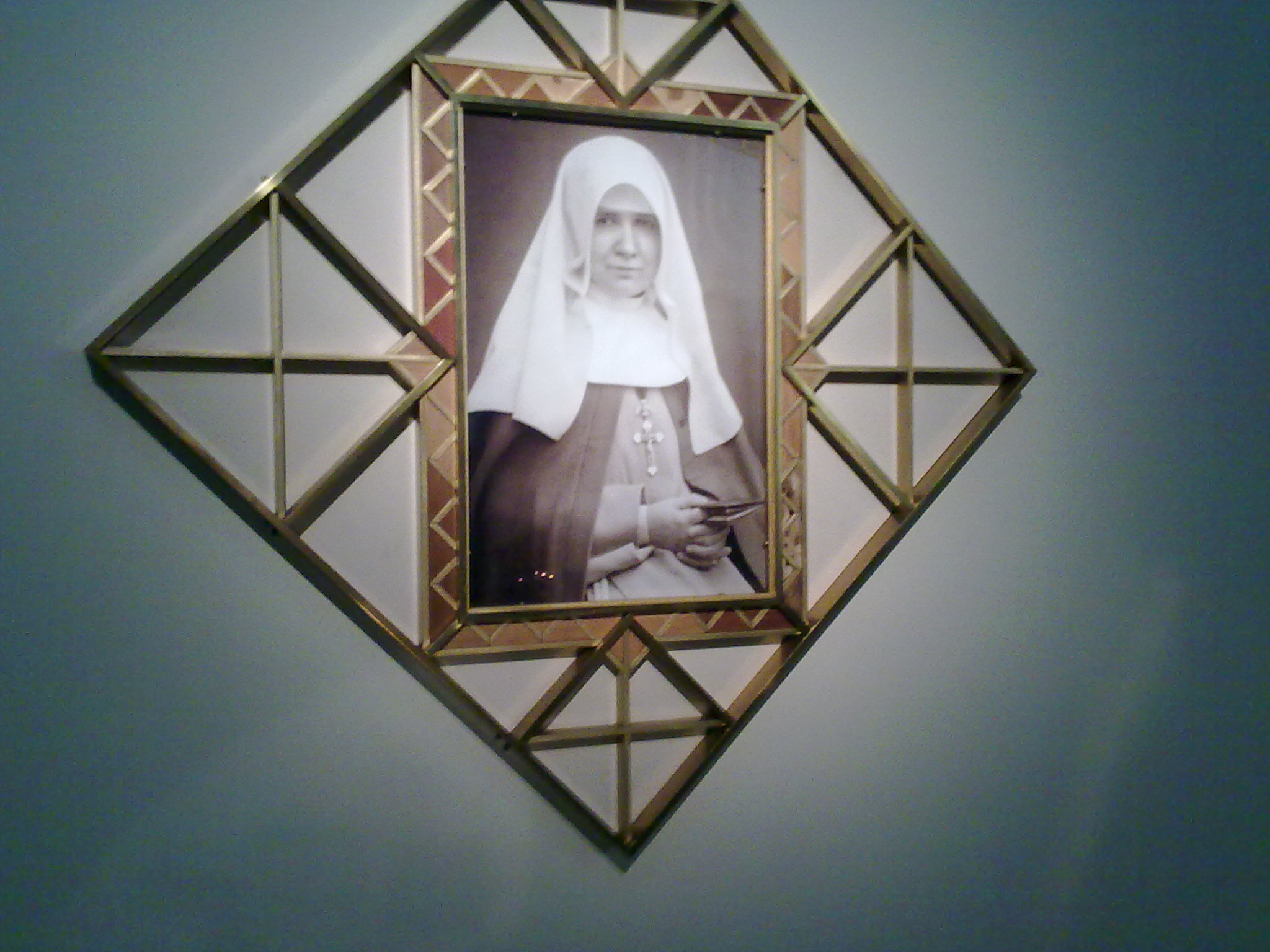 Ich habe diese Aufnahmen am 22. Oktober 2011 bei den Steyler Missionaren in den Niederlanden durchgeführt.